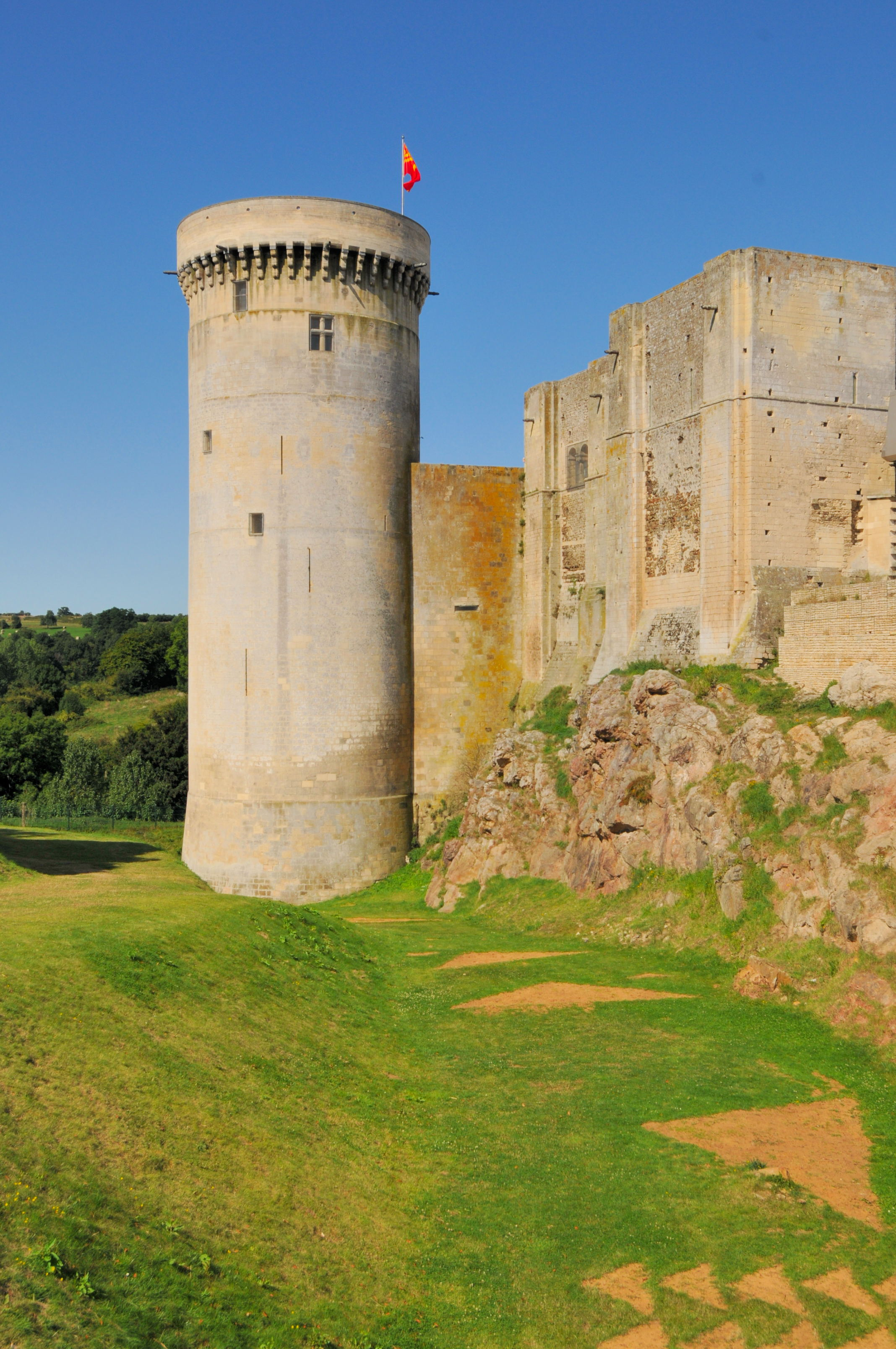 Chateau falaise 3.JPG Falaise calvados